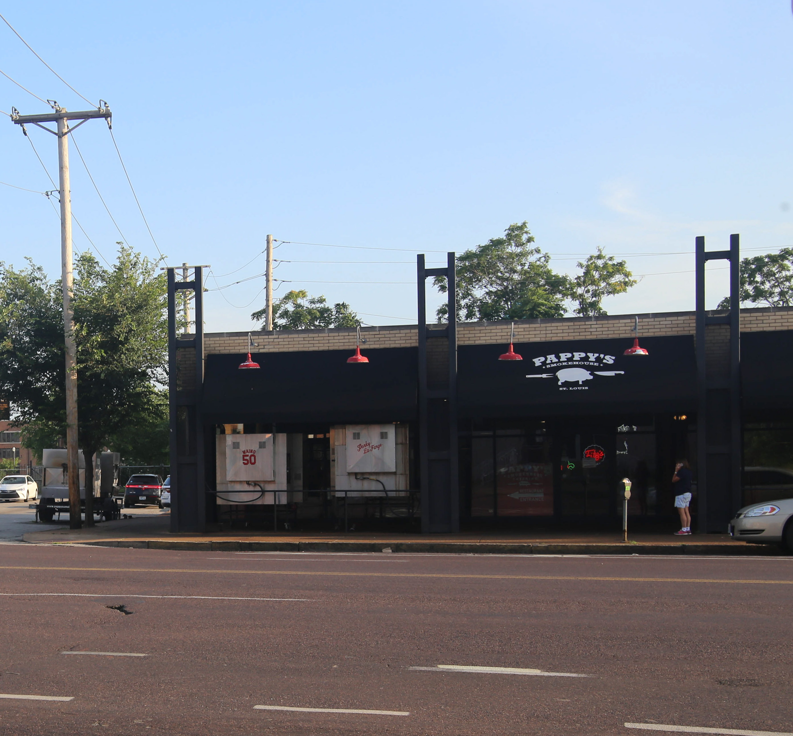 Pappy's